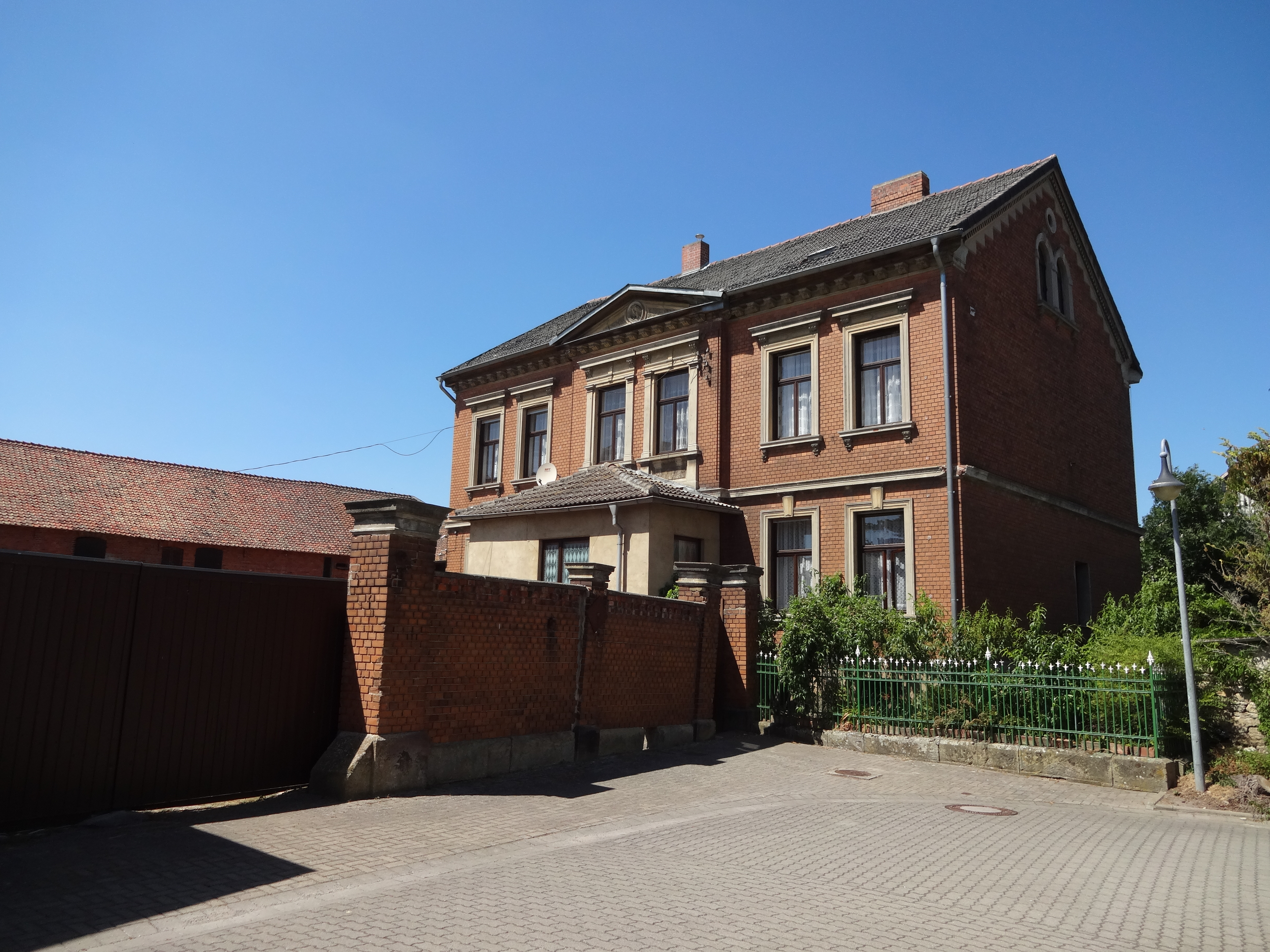 denkmalgeschütztes Bauernhaus in der Hinterstraße 6 in Dedeleben